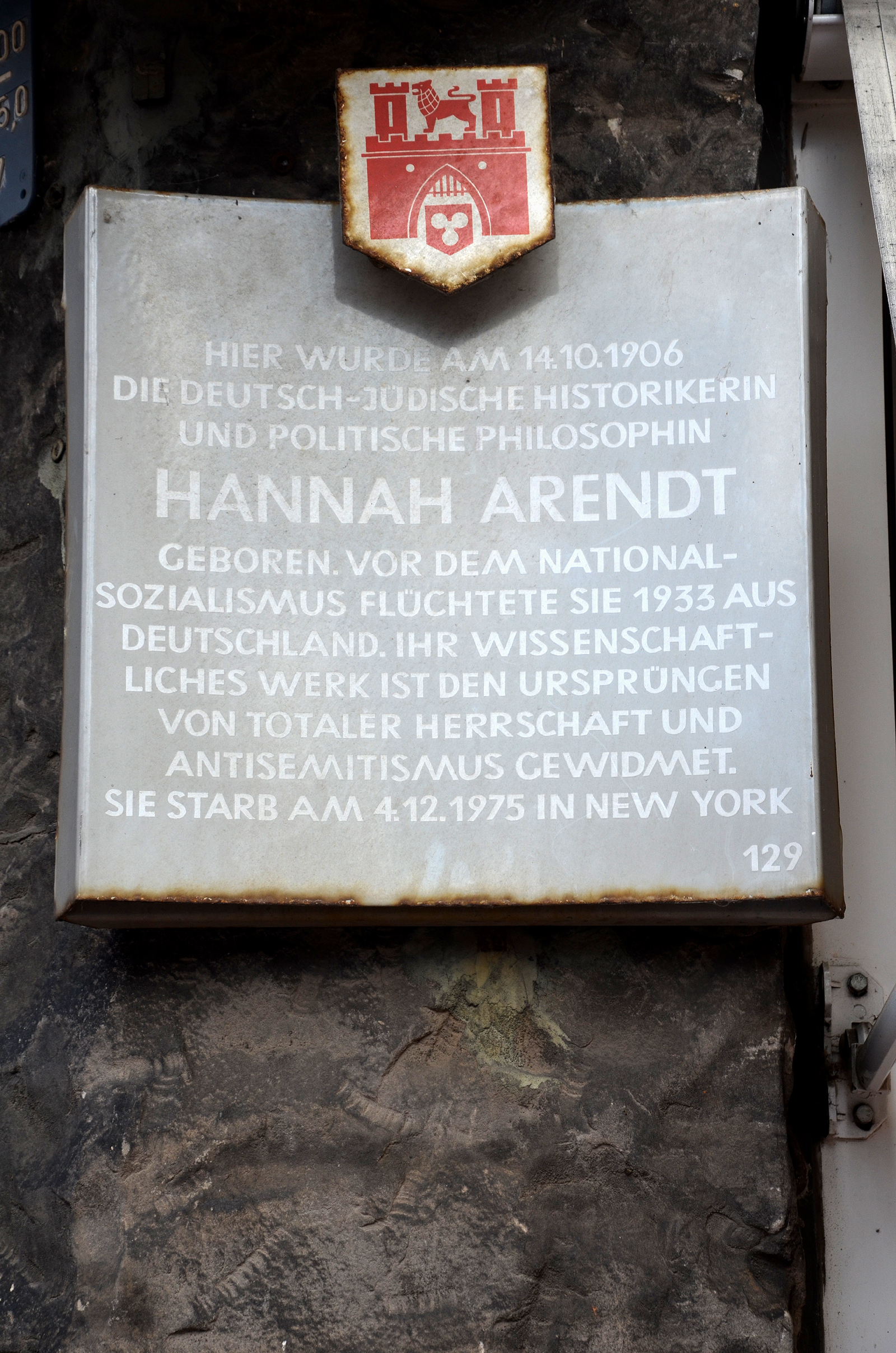 Am Lindener Marktplatz 2' am Lindener Marktplatz 2 Ecke Falkenstraße in Hannover, Stadtteil Linden-Mitte wurd die Stadttafel mit der Nummer 129 angebracht. Sie erläutert unter dem Wappen der Stadt: „Hier wurde am 14.10.1906 die deutsch-jüdische Historikerin und politische Philosophin Hannah Arendt geboren. Vor dem Nationalsozialismus flüchtete sie 1933 aus Deutschland. Ihr wissenschaftliches Werk ist den Ursprüngen von totaler Herrschaft und Antisemitismus gewidmet. Sie starb am 4.12.1975 in New York.“ ...